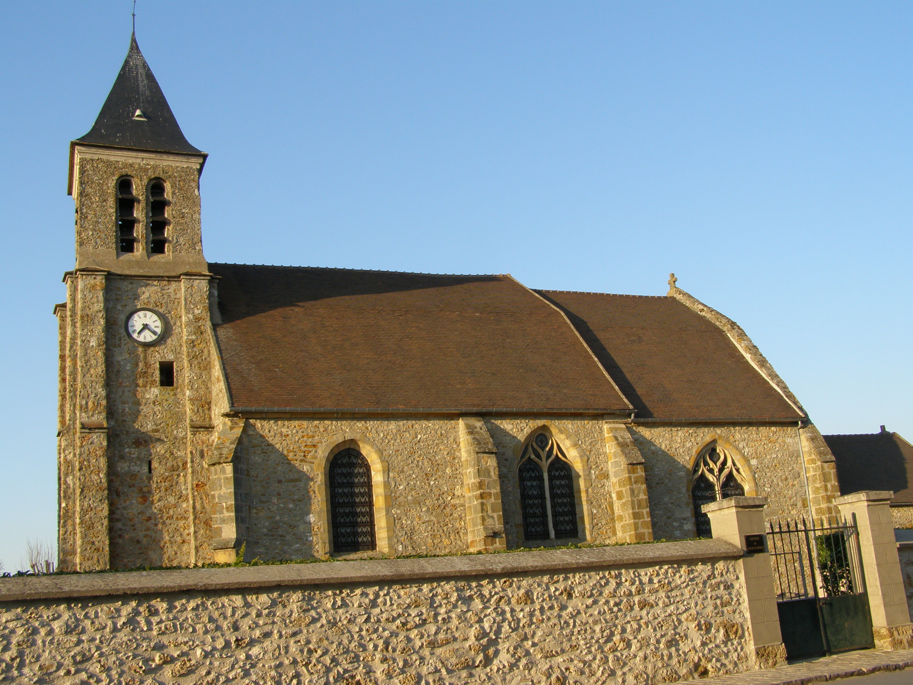 Magny-les-Hameaux, l'église Saint-Germain au Vieux Village